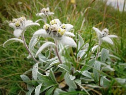 Leontopodium alpinum